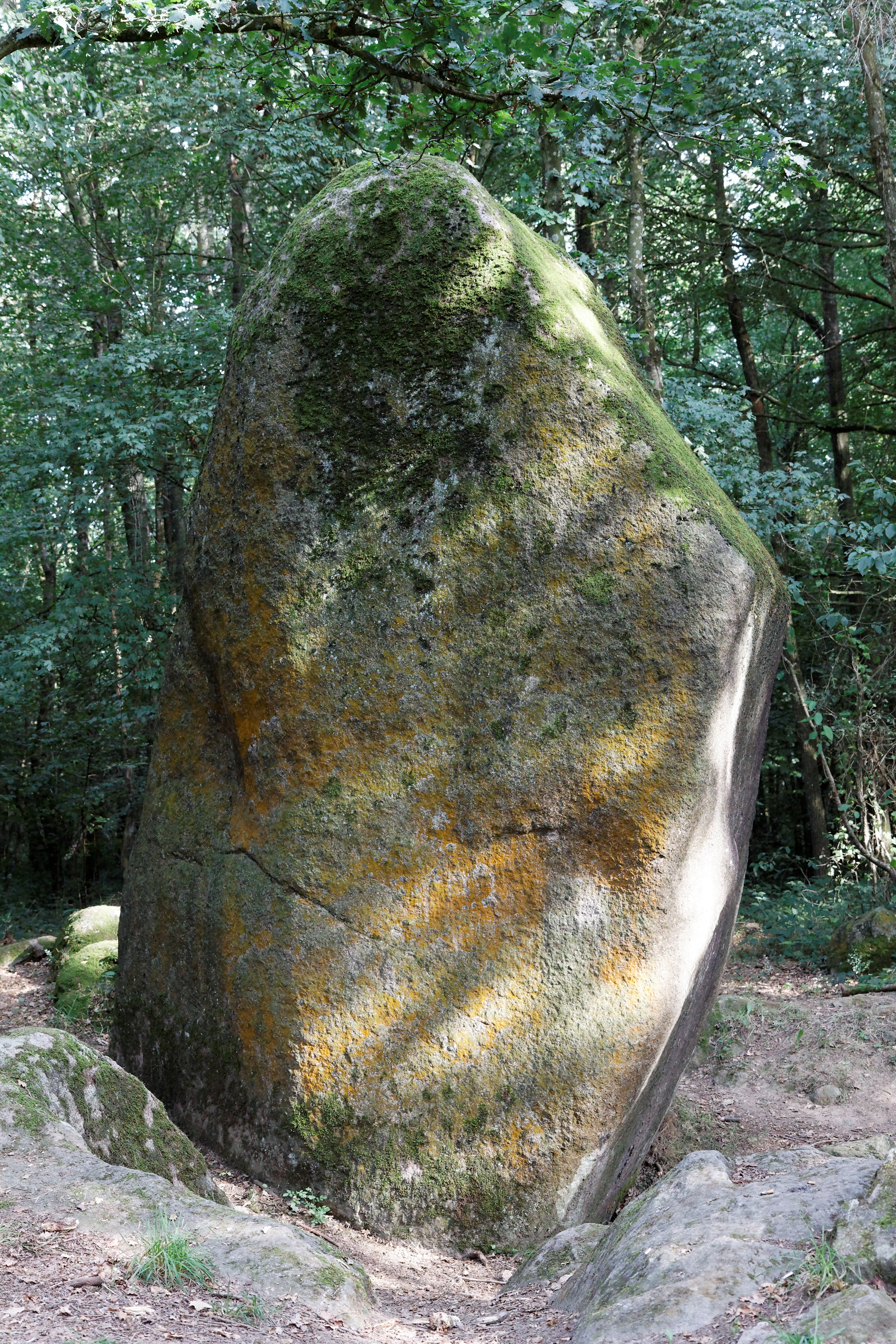 Le menhir de Guihallon à proximité de Tregomar, sur la commune de Lamballe (Côtes d'Armor).